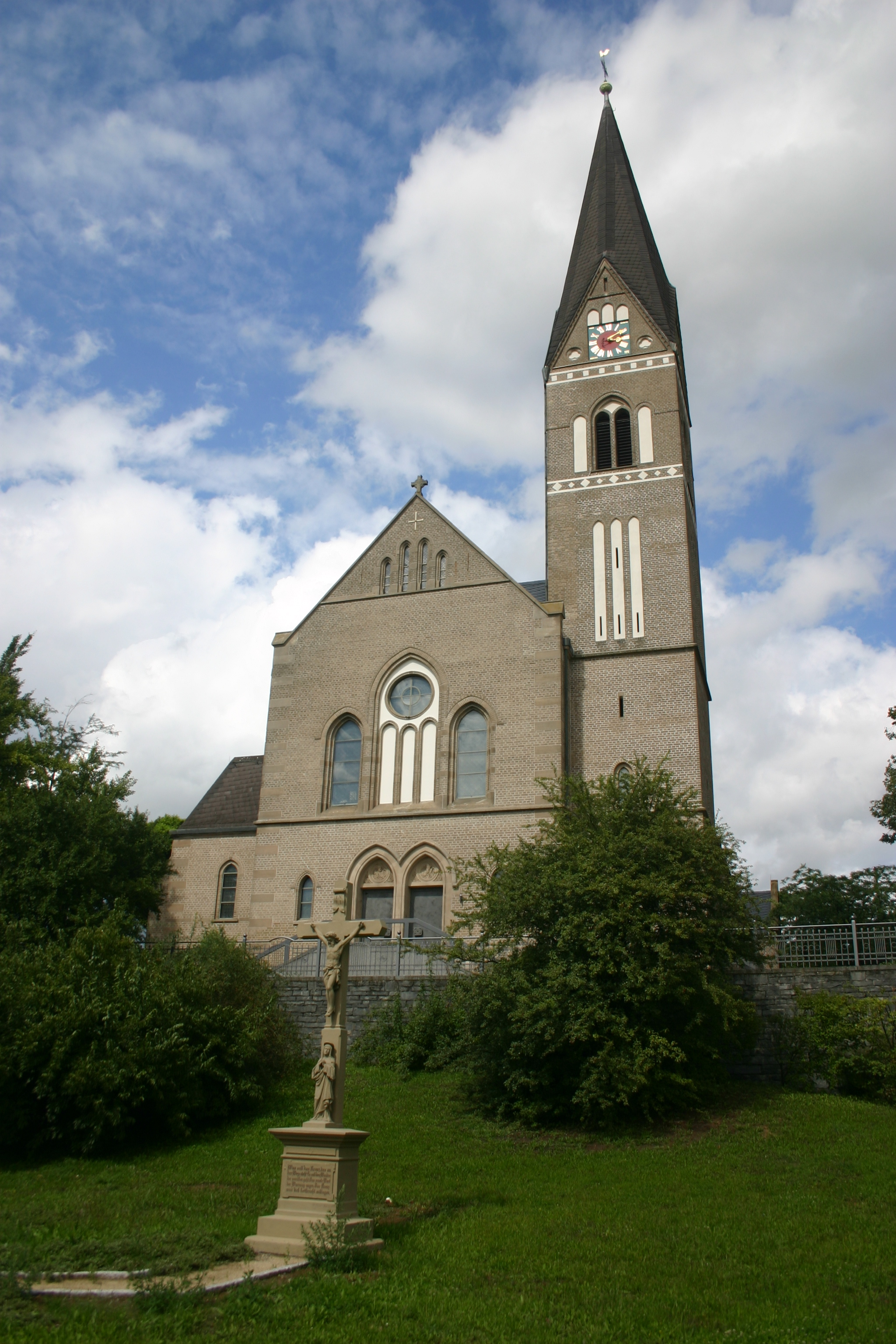 Katholische Kilianskirche Massenbachhausen Außen